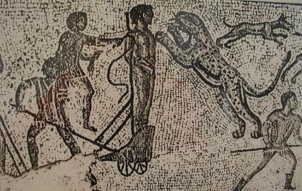 Christenhinrichtung durch Tierhatz. Nachbildung eines Mosaiks aus Rom.